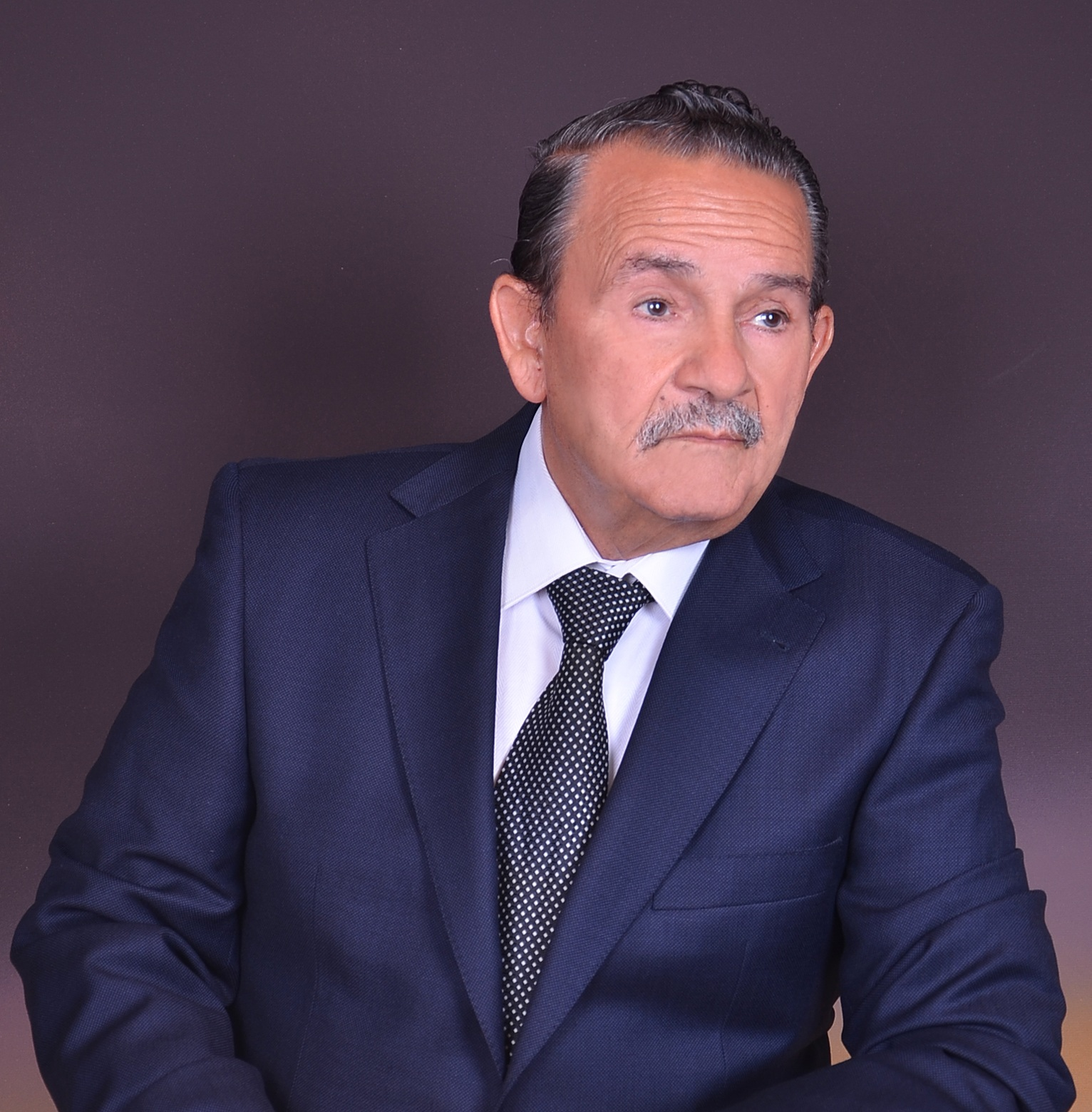 Əjdər İsmayılov (tam adı:İsmayılov Əjdər Tağı oğlu; d. 23 aprel, 1938. Çomaxtur, Şərur rayonu, Naxçıvan MSSR, Azərbaycan SSR) — filologiya elmləri doktoru, professor, 91-lərdən, YAP-ın ən fəal yaradıcılarından biri.